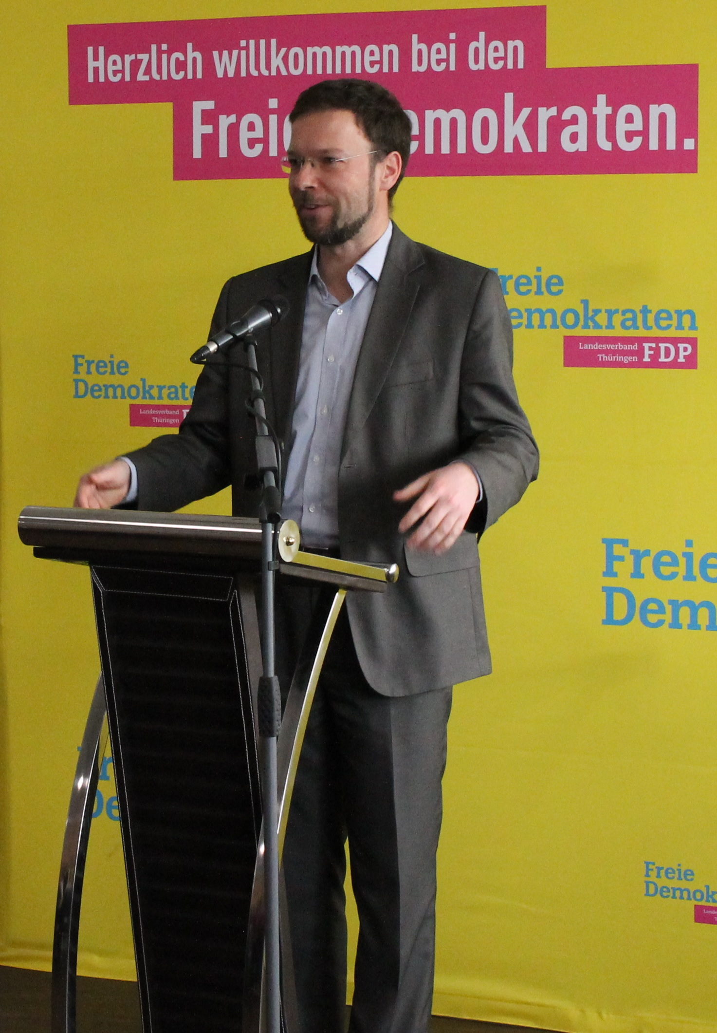 Thomas Nitzsche bei einer Wahlkampfveranstaltung zur Oberbürgermeisterwahl von Jena im April 2018.